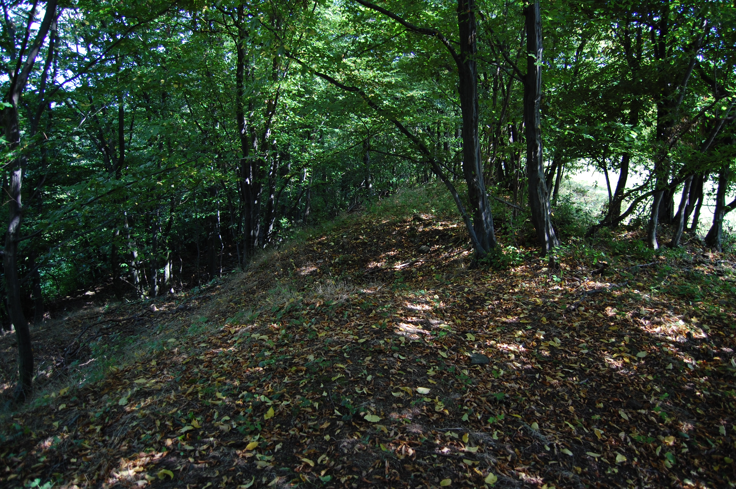 Val Starého Hradiska, Malé Hradisko, okres Prostějov